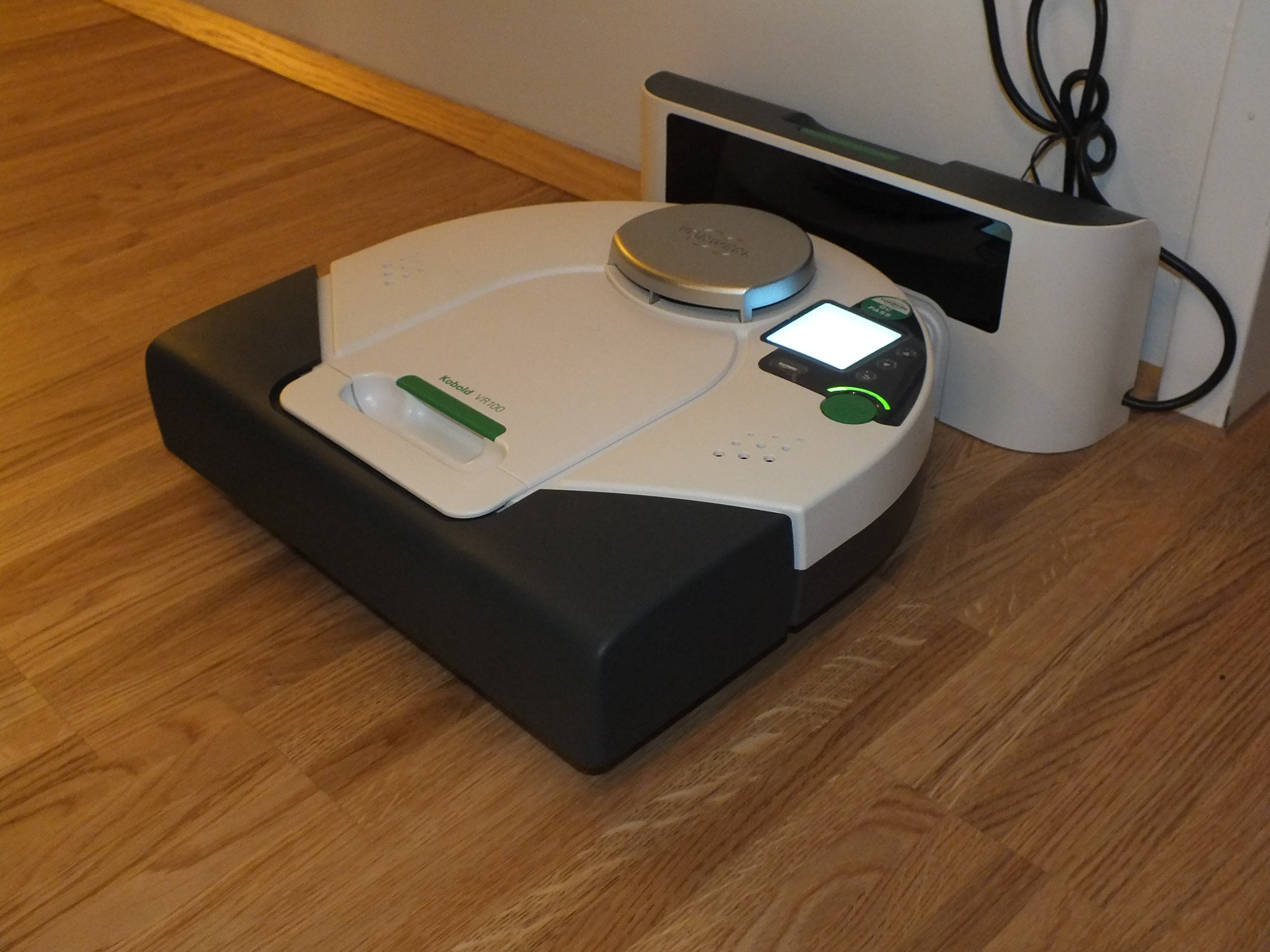 Staubsaugerroboter an seiner Basis.